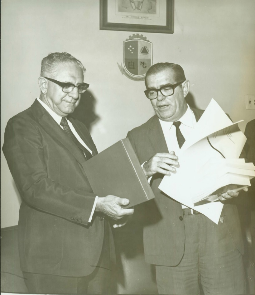 Oswaldo Pieruccetti e Paulo Campos Guimarães na década de 1950. Imagem do acervo iconográfico do Arquivo Público Mineiro, código PCG-3.2-002